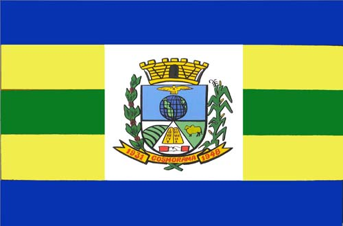 Bandeira de Cosmorama, São Paulo, Brasil